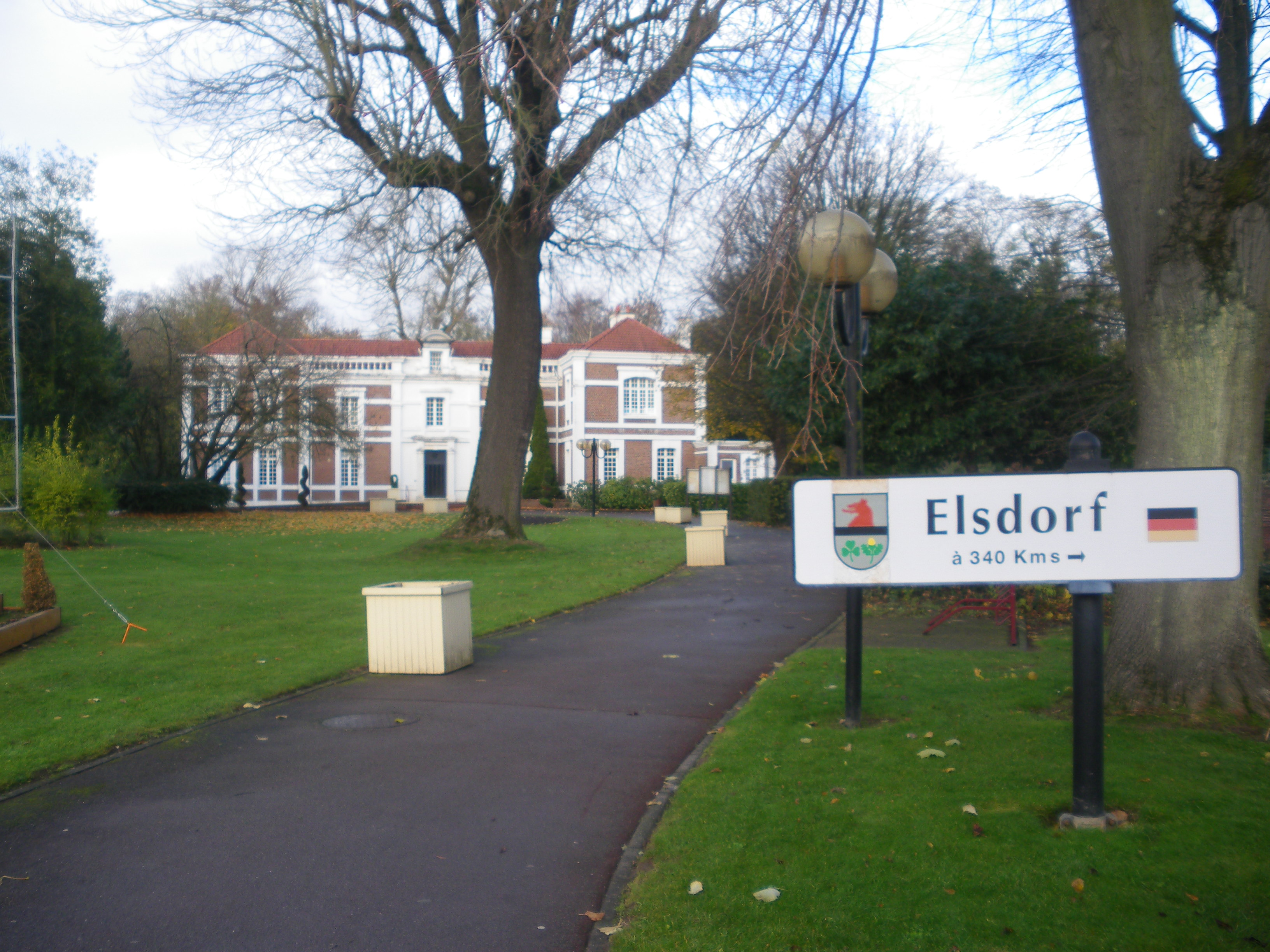 Vue de l'hôtel de ville de la commune de Bully-les-Mines.